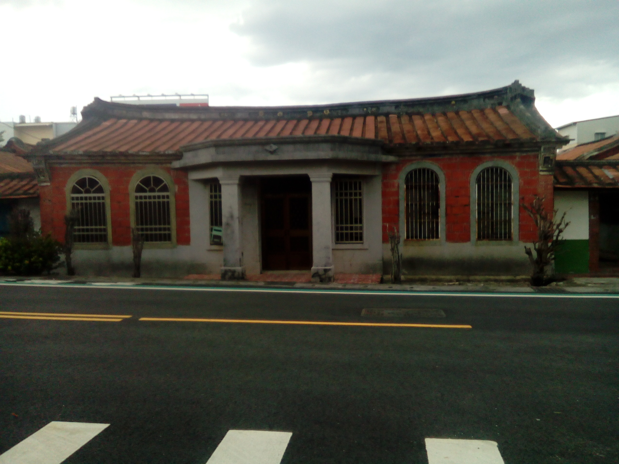 位於新埤市區南側(近大橋) 台一線省道和新民路之Y字路口 三山國王廟對面 為鄉內著名之古蹟